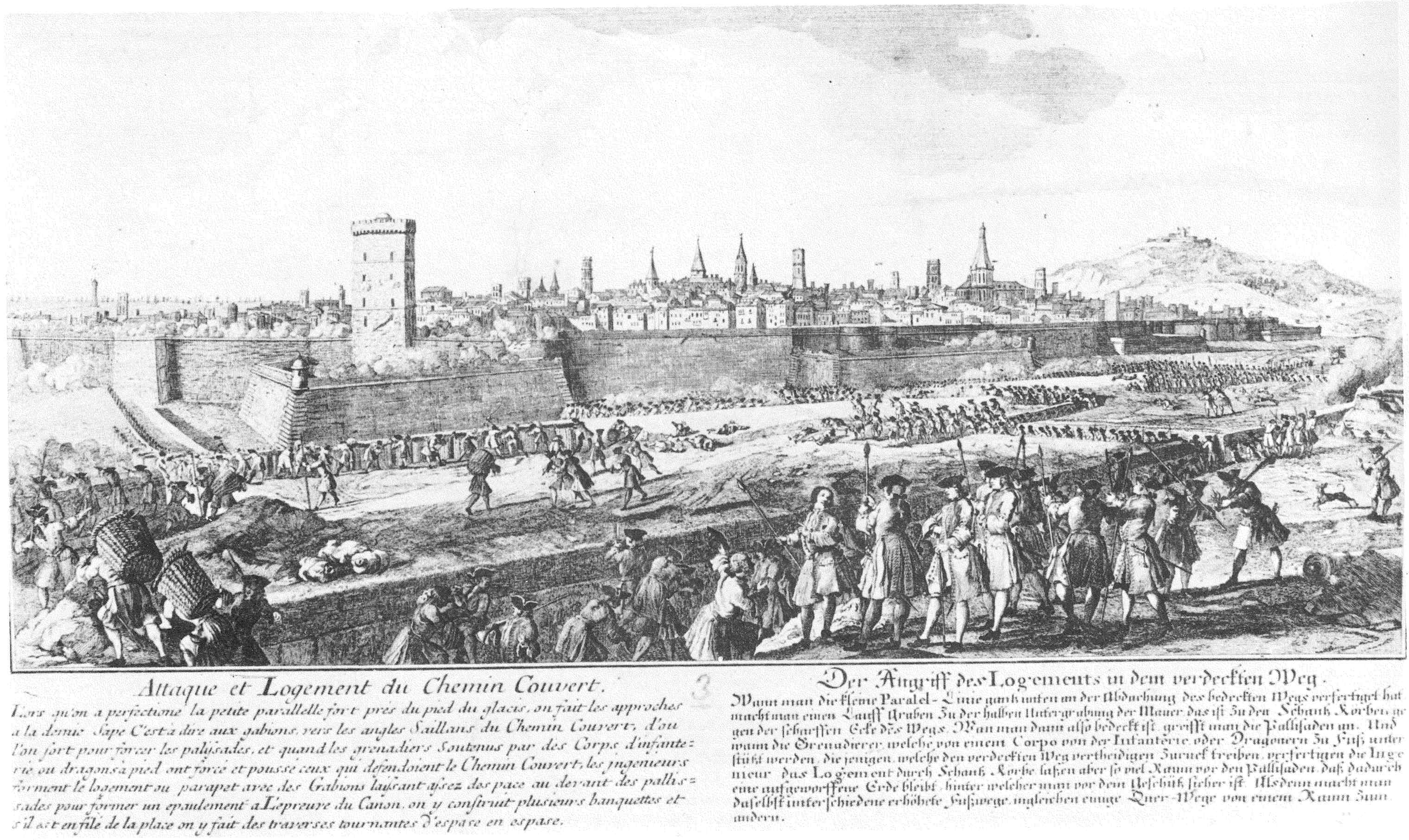 Gravat dibuixat pel pintor francès J. Rigaud l'any 1714 on es mostra el setge de la ciutat de Barcelona per part de les tropes de Felip V. Aquest indret precís es correspondria al tram de muralla del baluard del Portal Nou, lloc on s'obri una escletxa per entrar a la ciutat.